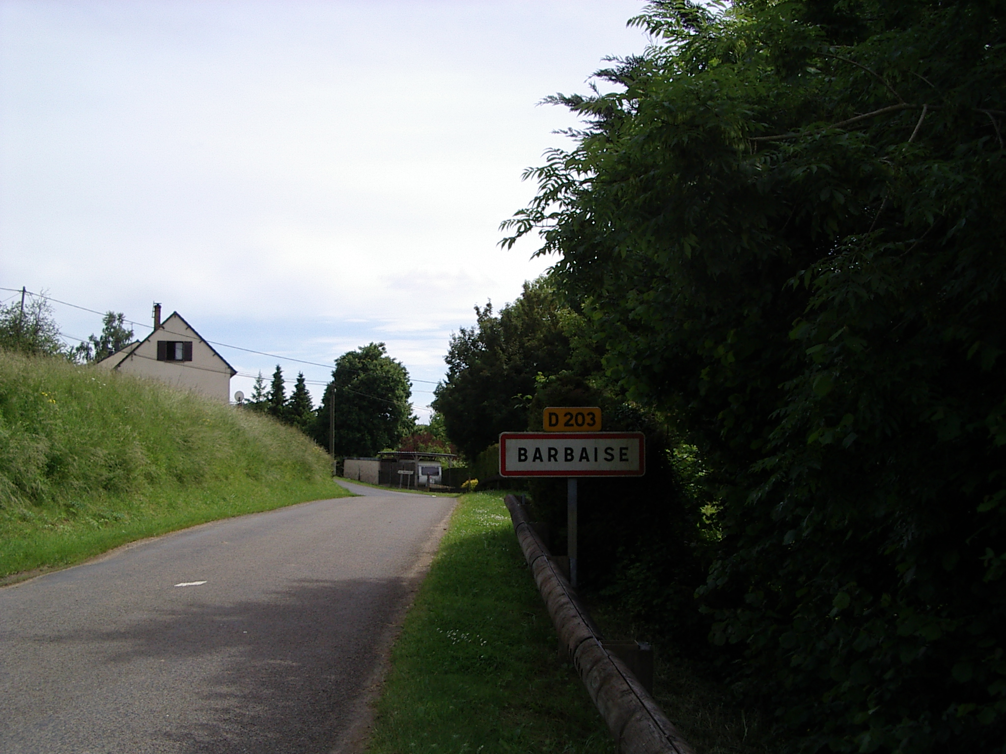 Barbaise est une commune française, située dans le département des Ardennes et la région Champagne-Ardenne